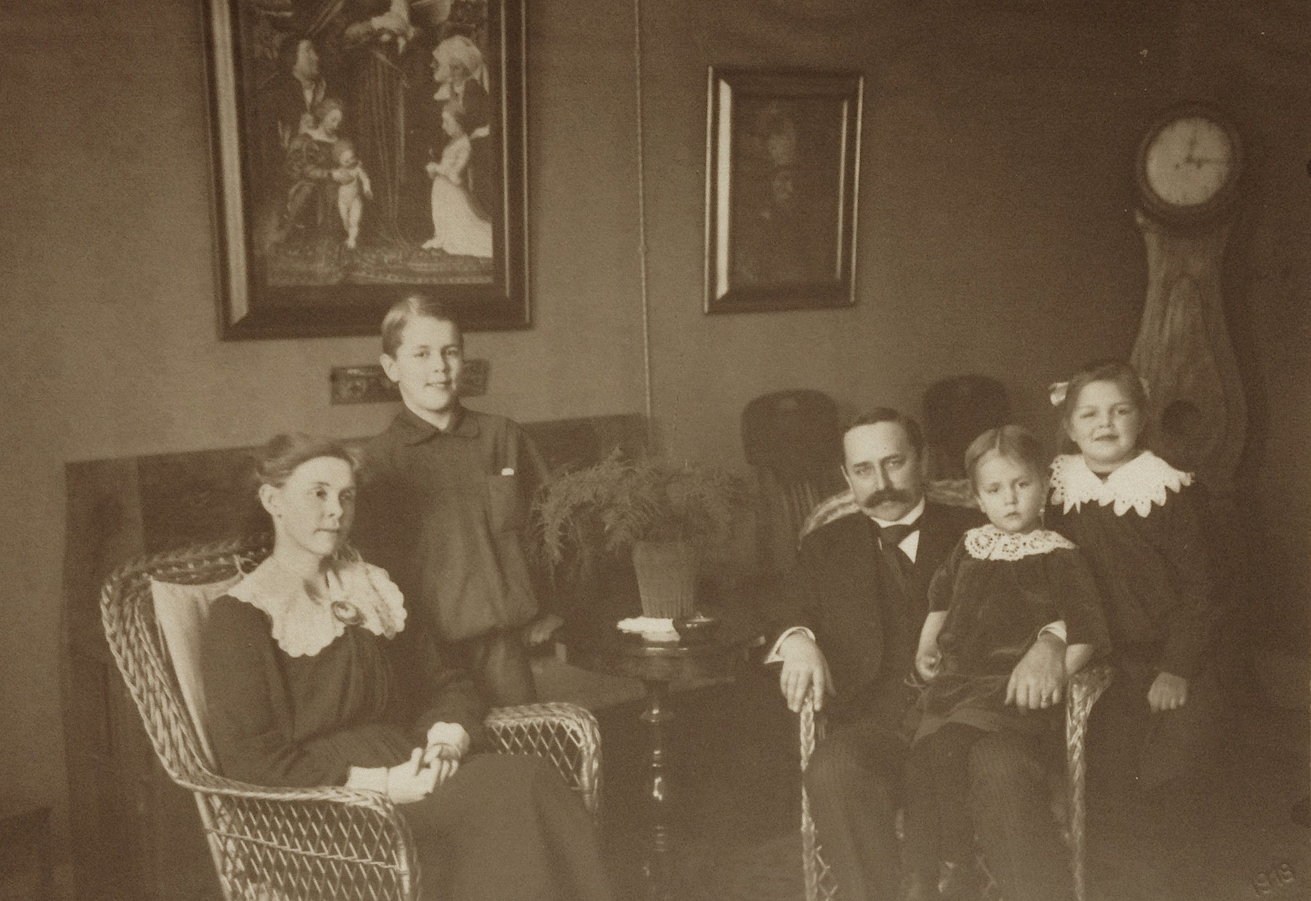 Nils Edén med hustru Marja född Wallmark och barn.